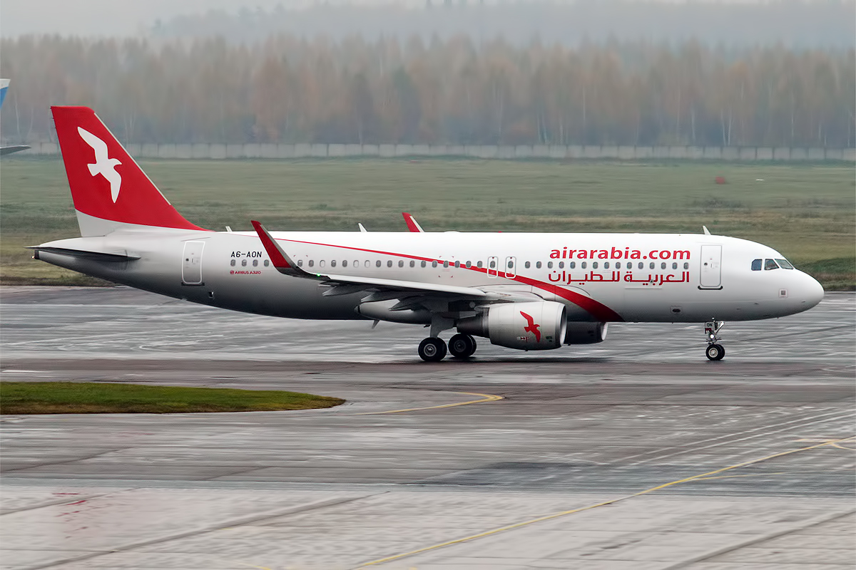 Air Arabia, A6-AON, Airbus A320-214